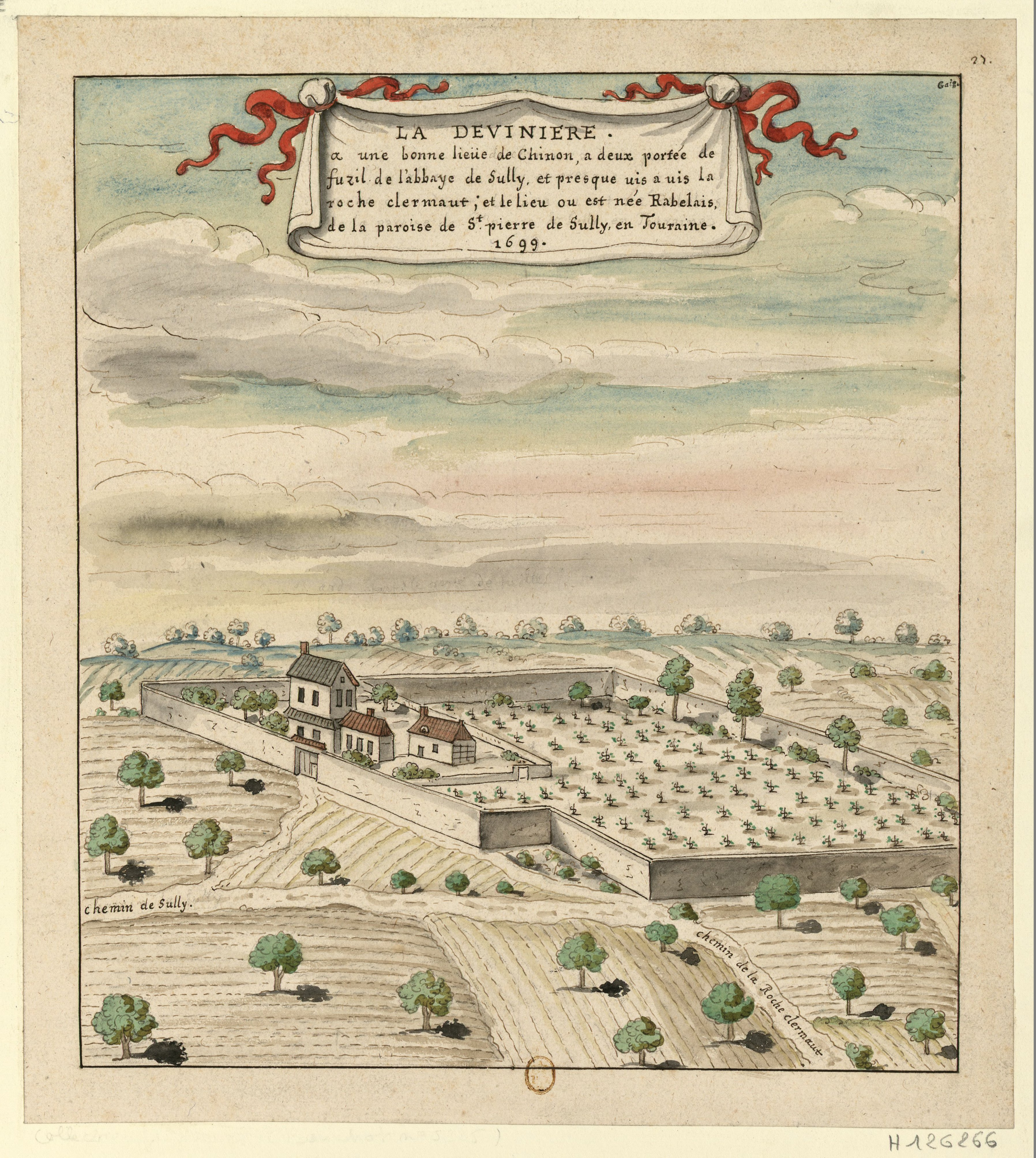 Estampe de la Devinière, lieu supposé de la naissance de Rabelais